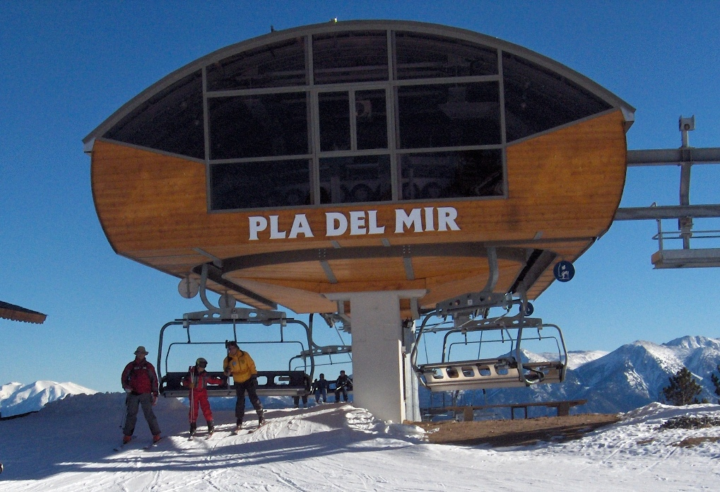 Estació superior de telecadira desembragable de 6 places als Angles (Capcir, Catalunya Nord). Fotografia pròpia. Télésiège debrayable de 6 places aux Angles (Capcir, Catalogne). Detachable high-speed 6-pack at the Angles (Capcir, Catalonia). Own work.